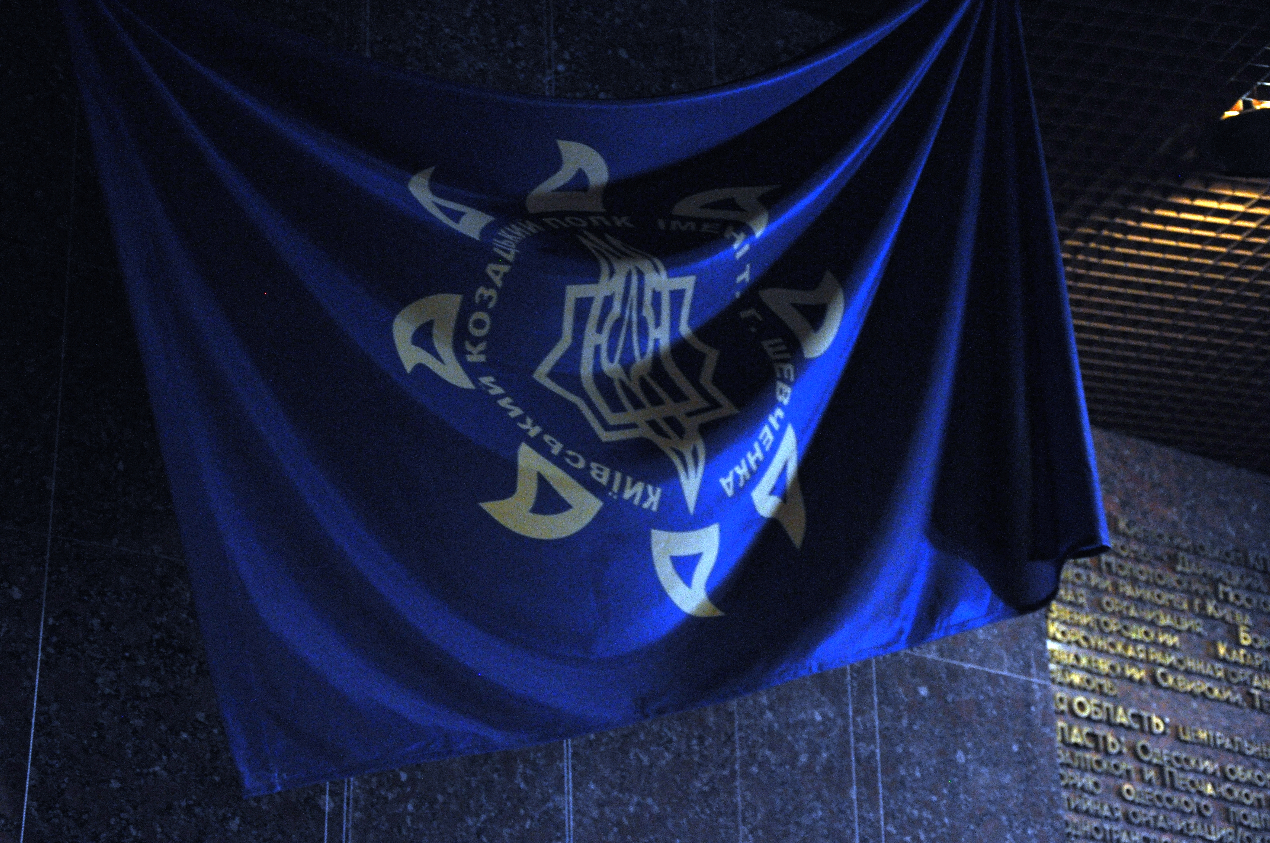 Прапор Київського козацького полку ім. Т.Шевченка БУК в музейном спецпроекті «Прапори воїнів АТО»